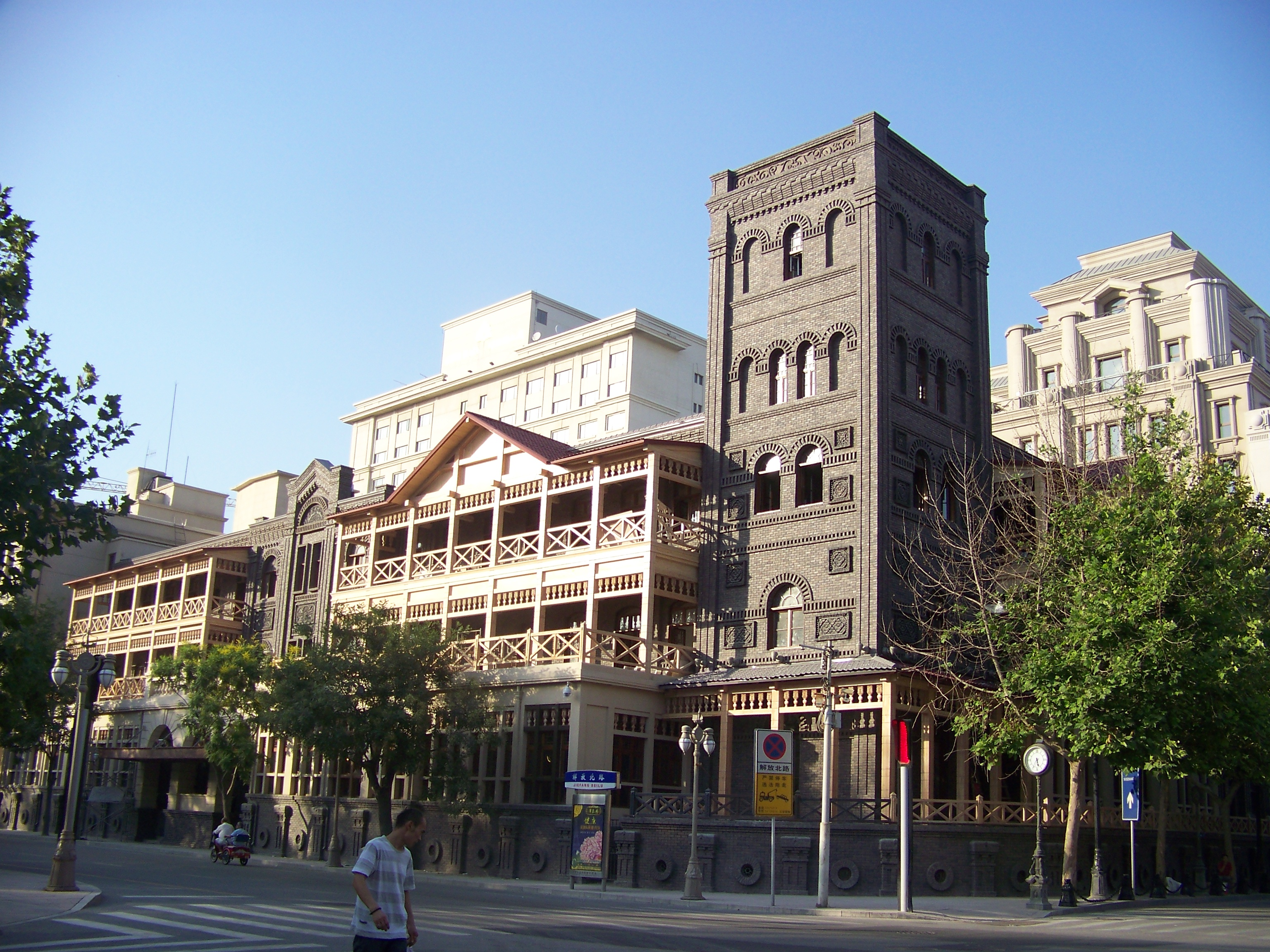 利顺德